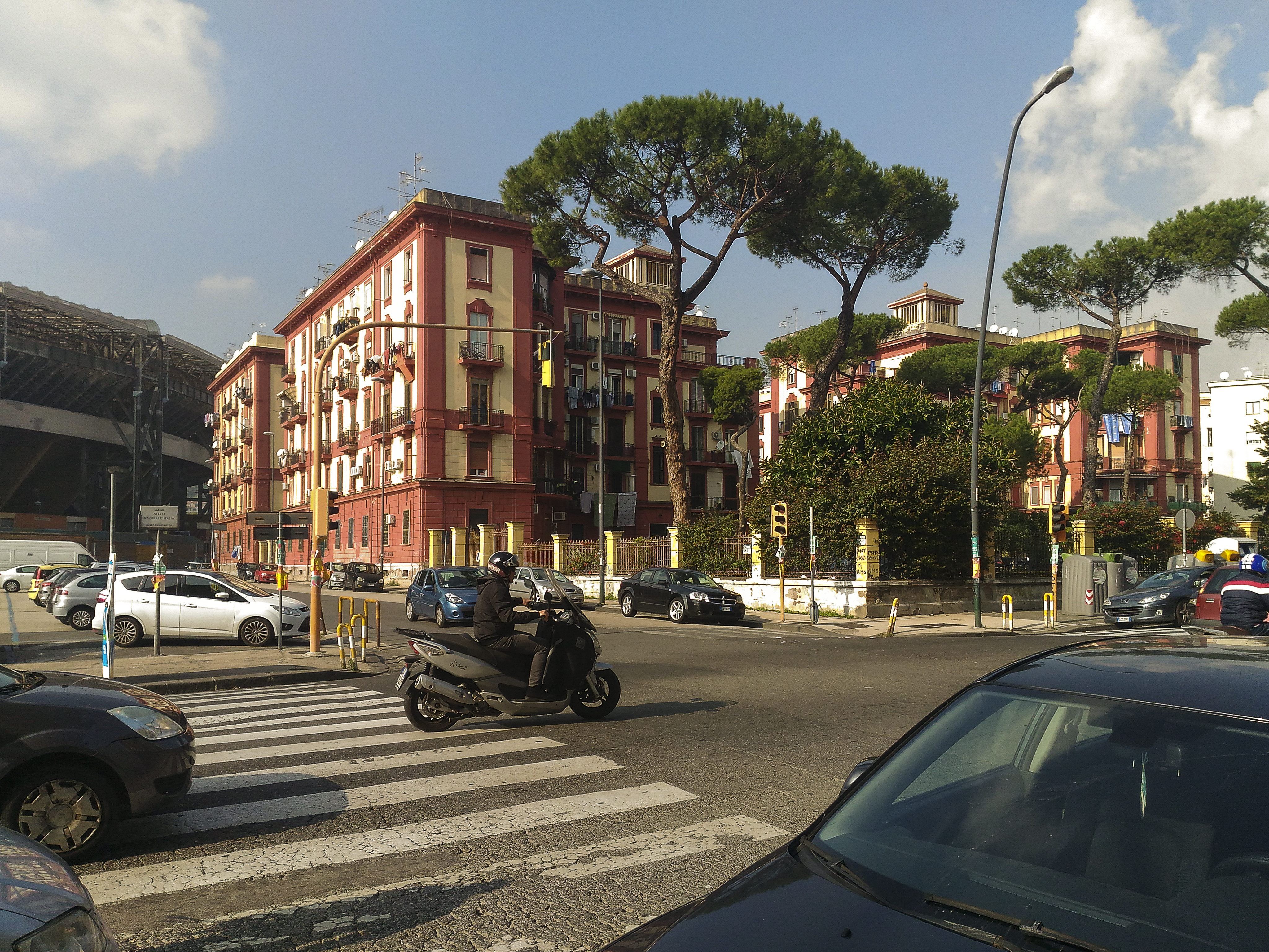 Veduta d'insieme del Rione Nicola Miraglia, 1928, da via Leopardi.